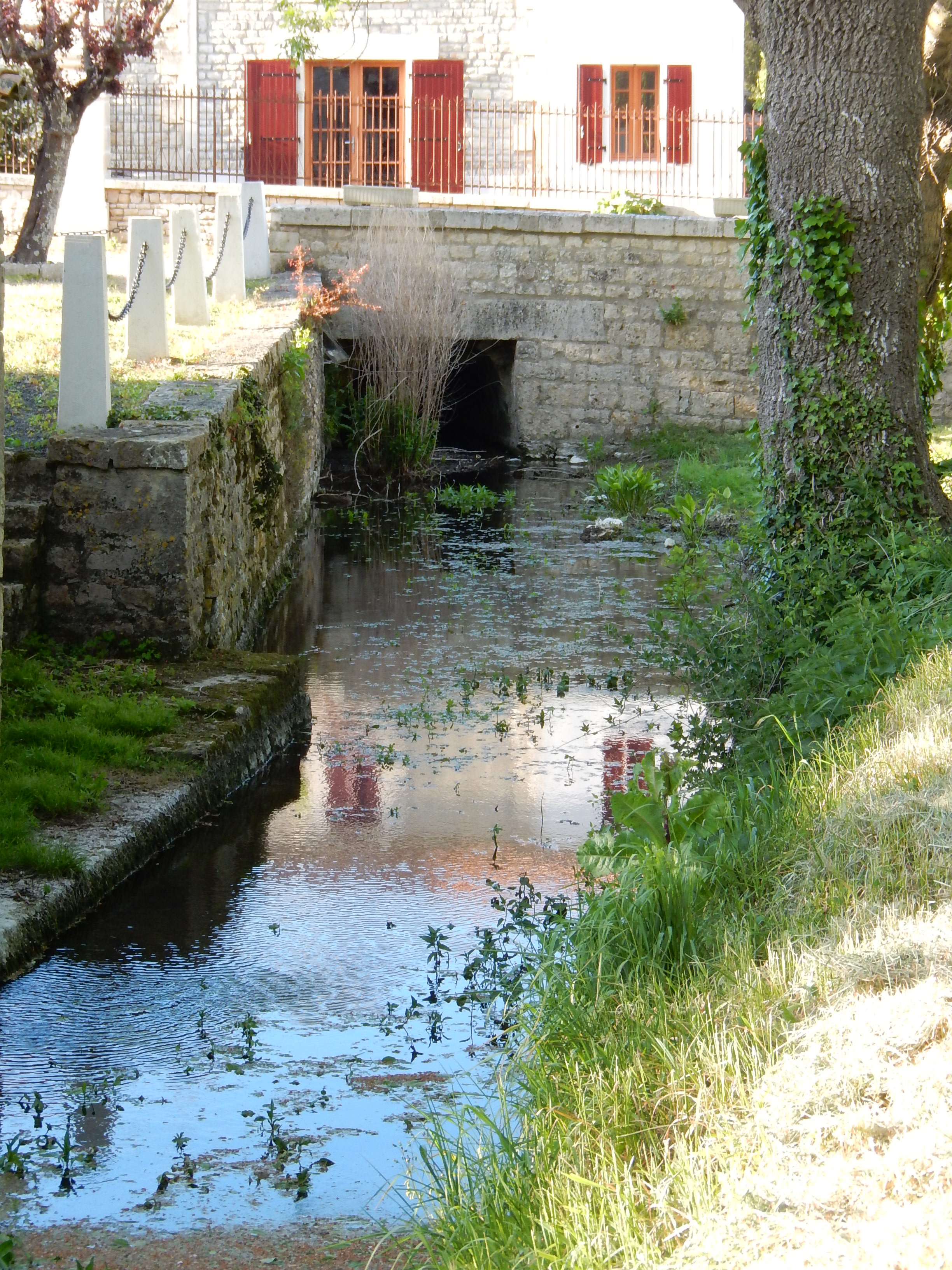 La rivière Mignon, à Dœuil sur le Mignon (Charente-Maritime, France).